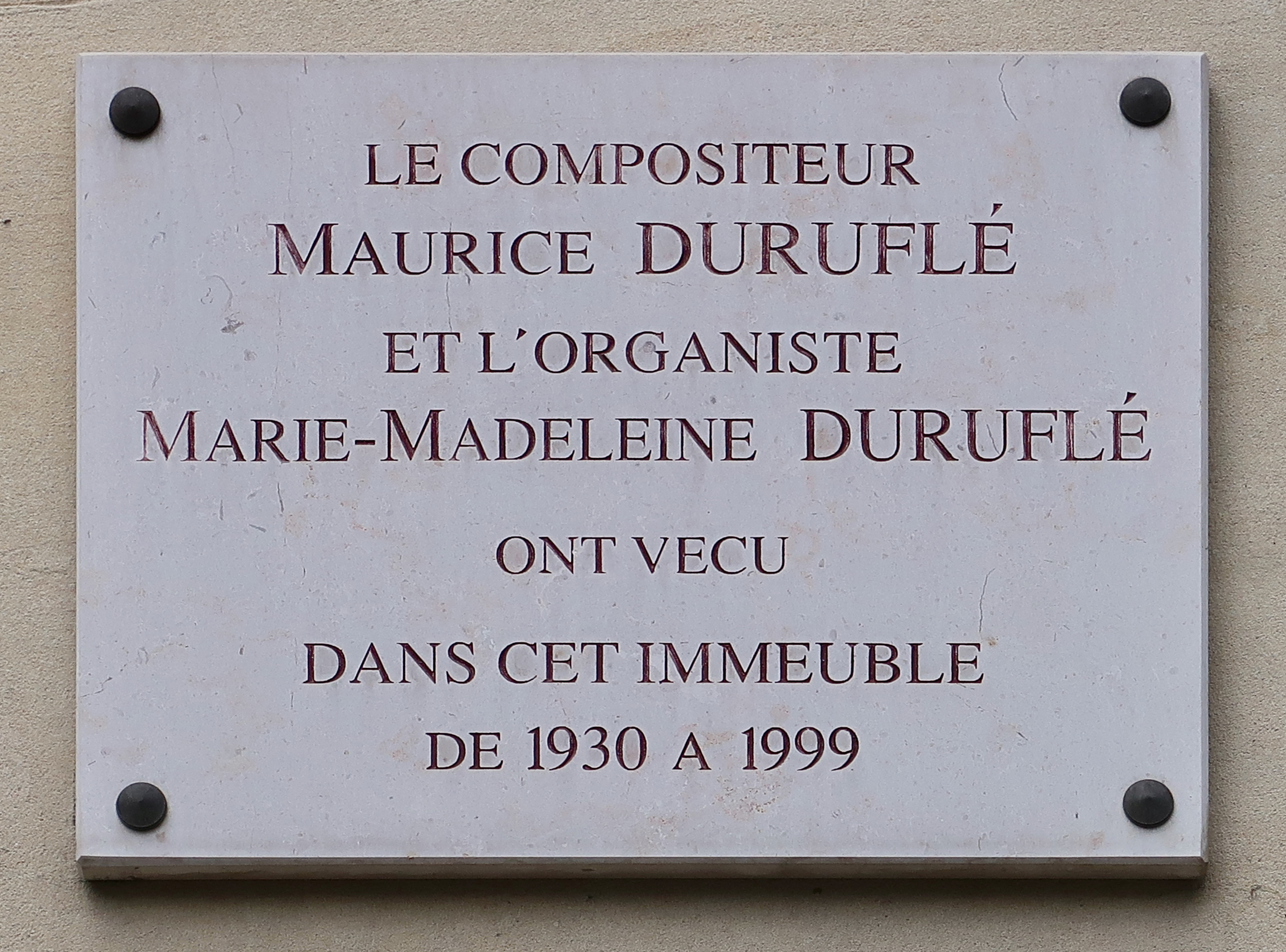 Plaque Maurice et Marie-Madeleine Duruflé, 6 place du Panthéon (Paris, 5e).